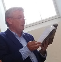 Ag léamh as a leabhair "Éagóir" ag a seoladh 19 Bealtaine 2016